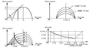 Graphes d'évolution de paramètres physiques relatifs au fonctionnement des moteurs à allumage commandé.